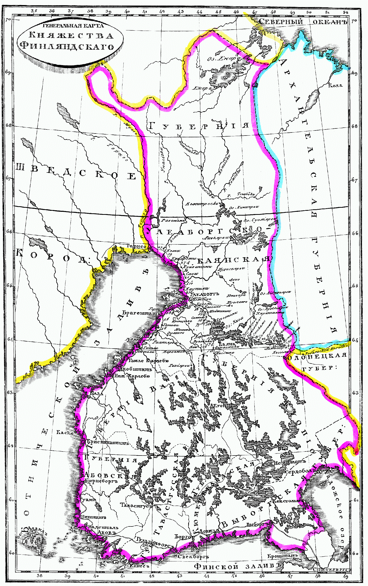 Карта Великого княжества Финляндского, 1835